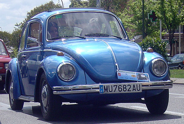 VW Beetle from MadridVolskwagen Beetle 3